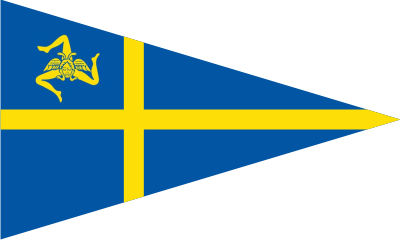 Burgee of Circolo della Vela Sicilia